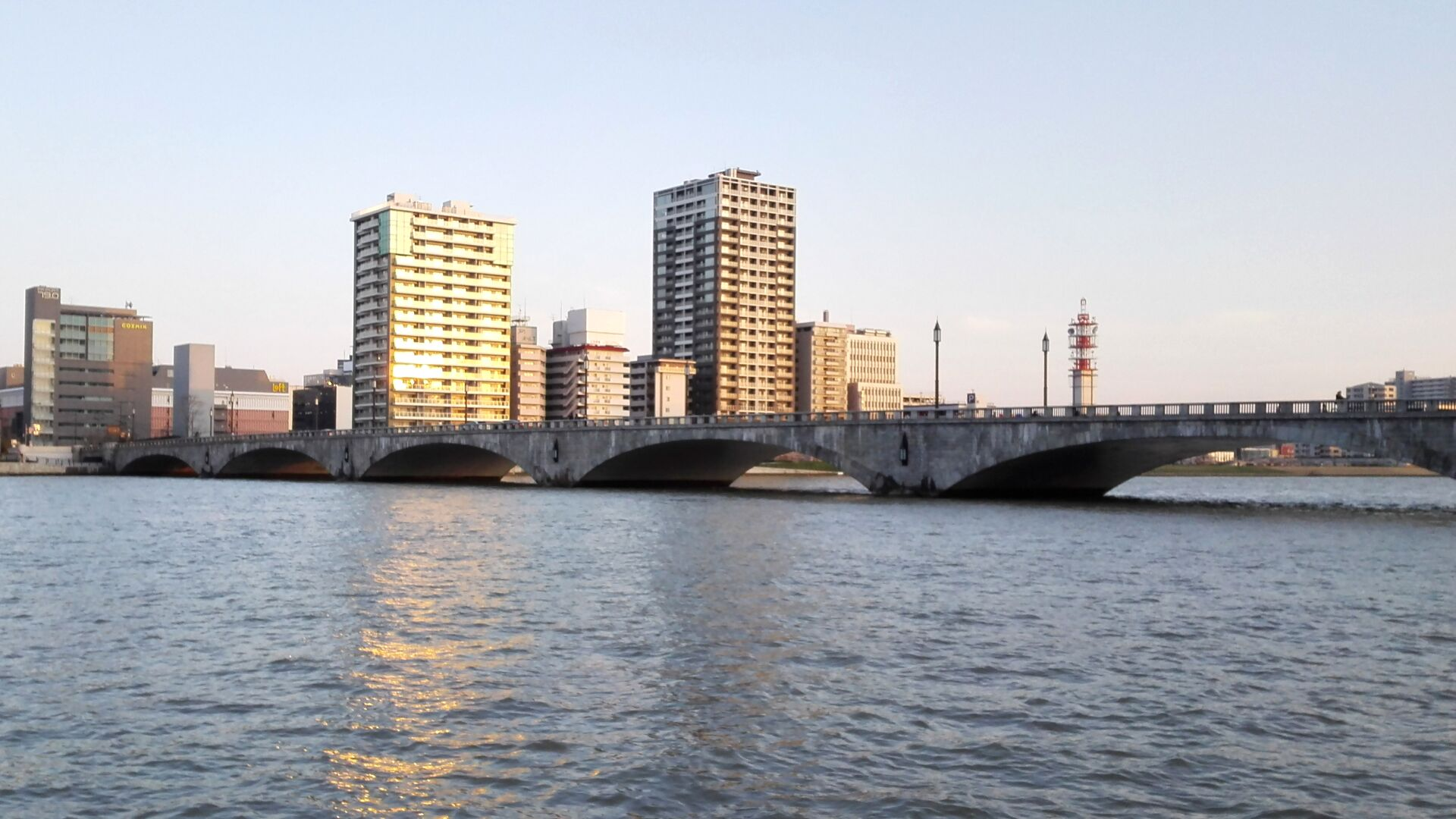 下流側から撮影